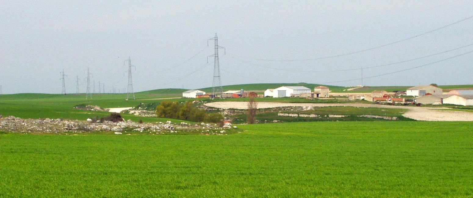 Las Henaras, Fuente La Fraila, La Revilla. Torres de Alta tensión.